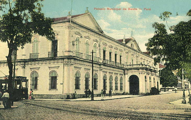 Palácio Antônio Lemos, em fotografia colorida (c. 1907).